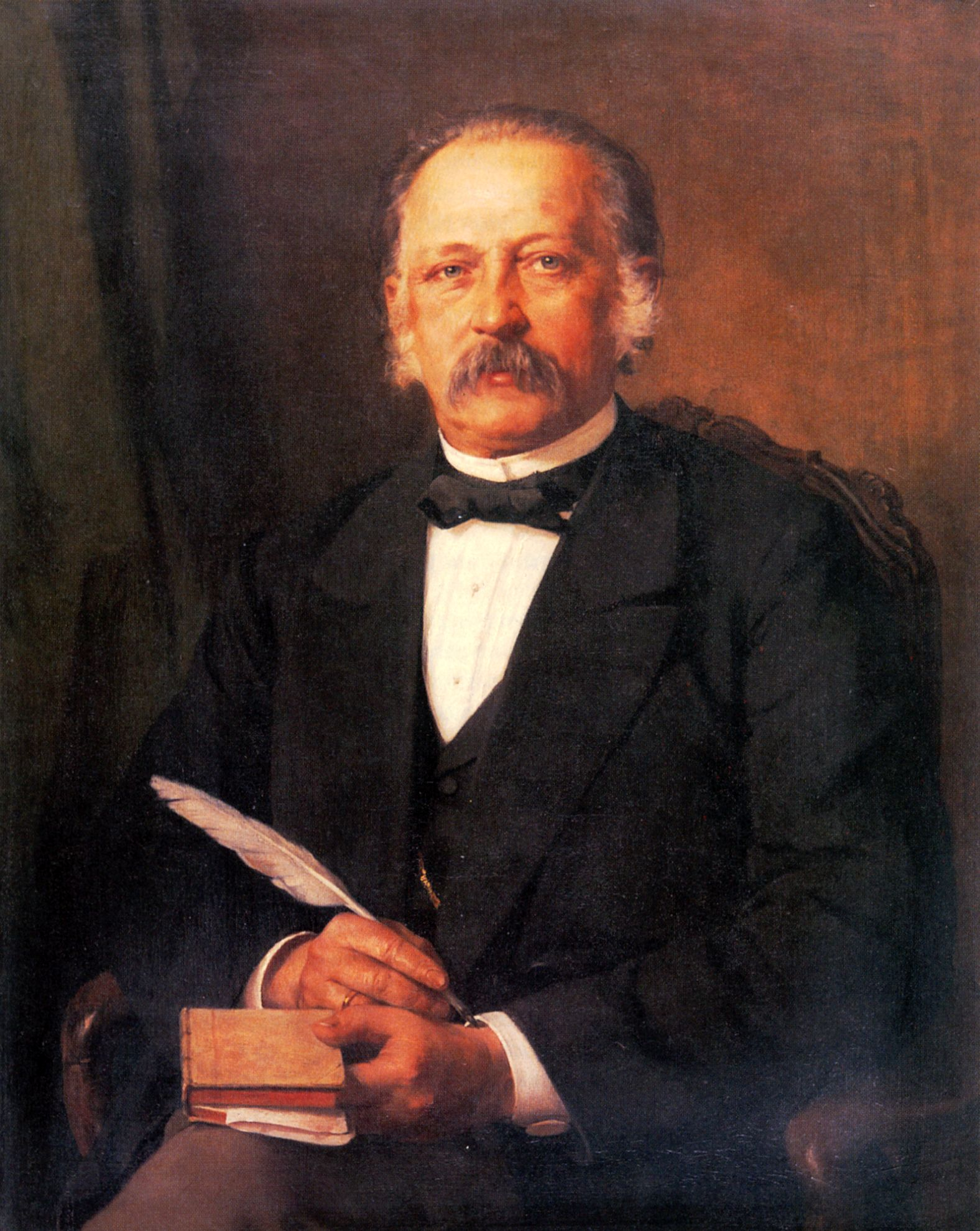 Theodor Fontane (Gemälde von Carl Breitbach, 1883)